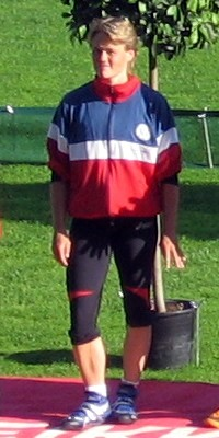 Paula Tarvainen Kalevan kisoissa, Ratinan stadionilla, Tampereella, 26. heinäkuuta 2008